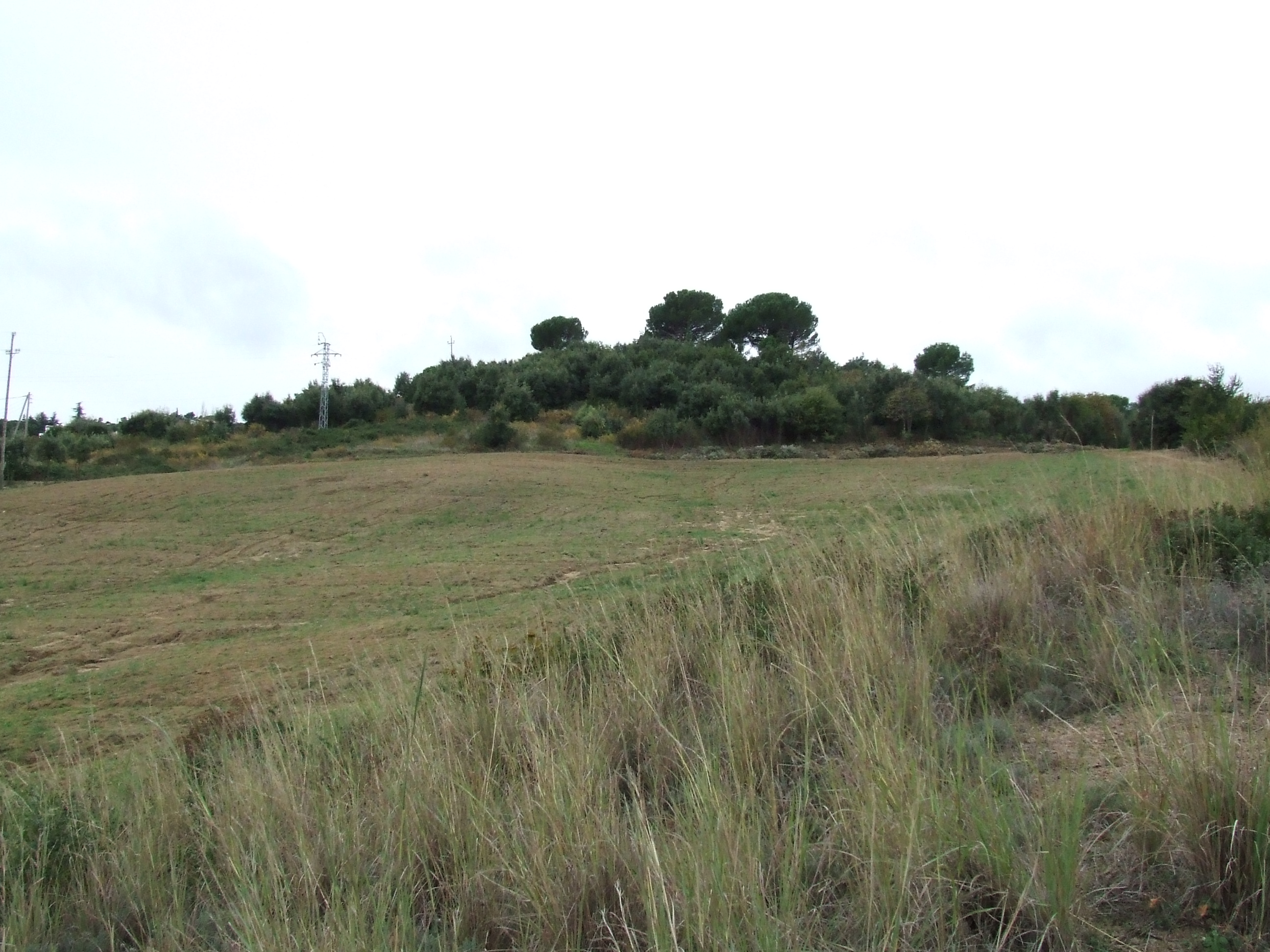 Turó del Camp Gran (Bigues i Riells, Vallès Oriental)